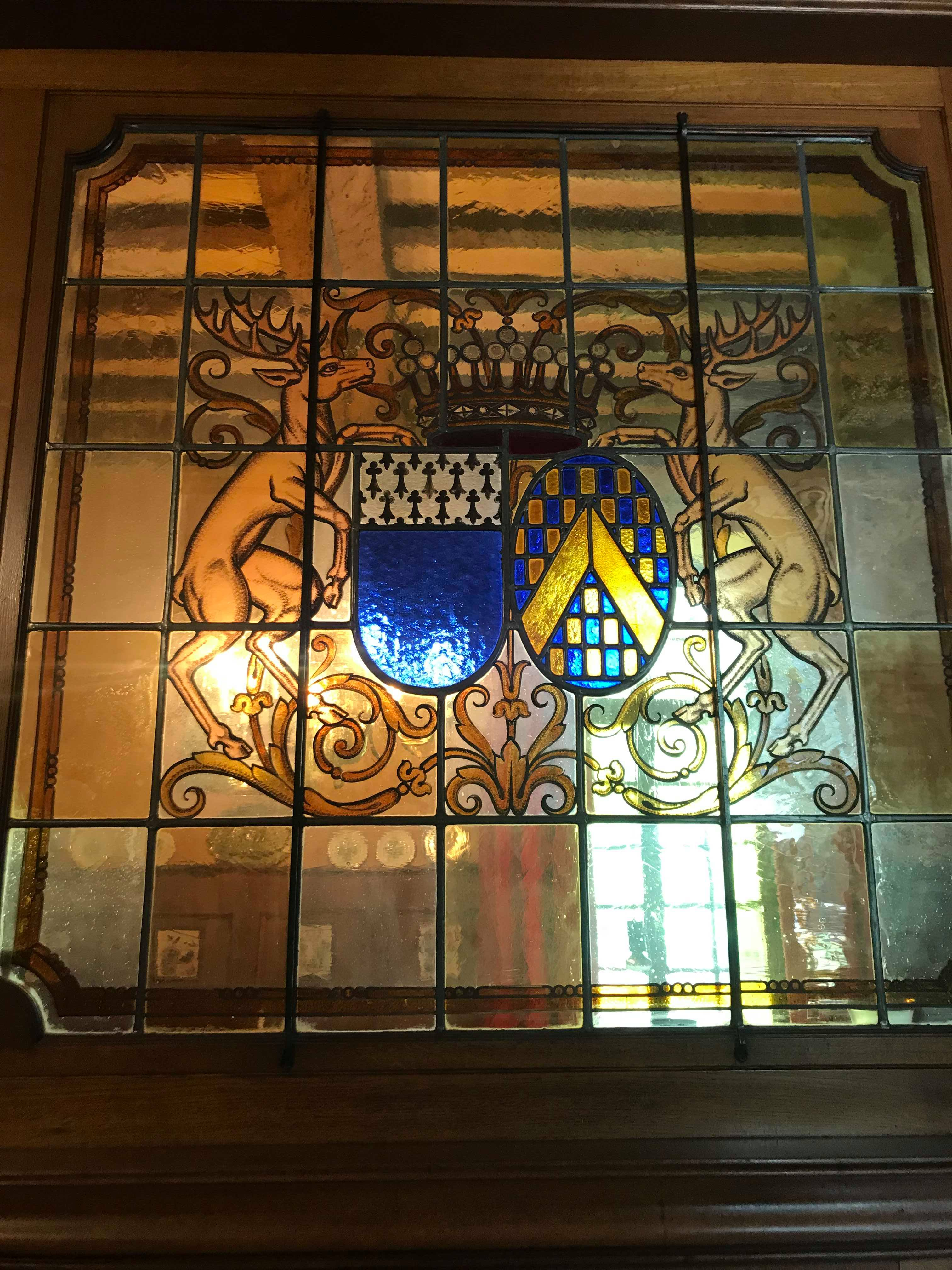 Op dit wapenschild wordt de Familie de Lichtervelde en de Familie de Fourneau afgebeeld. Deze wordt gepresenteerd in de inkomhal van het Kasteel Kruikenburg.